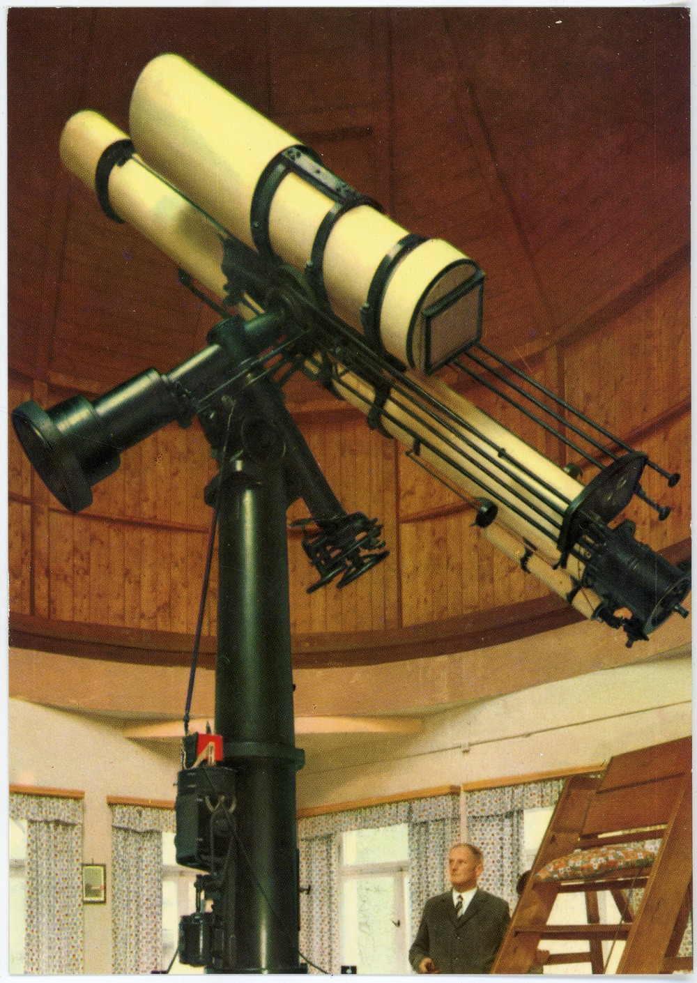 Pulsnitz; Sternwarte This postcard is from publisher Brück & Sohn in Meißen ( postcard has a unique number 30221 and is available in a higher resolution at the publisher. This images was uploaded in a cooperation project between Wikipedians and the publisher.